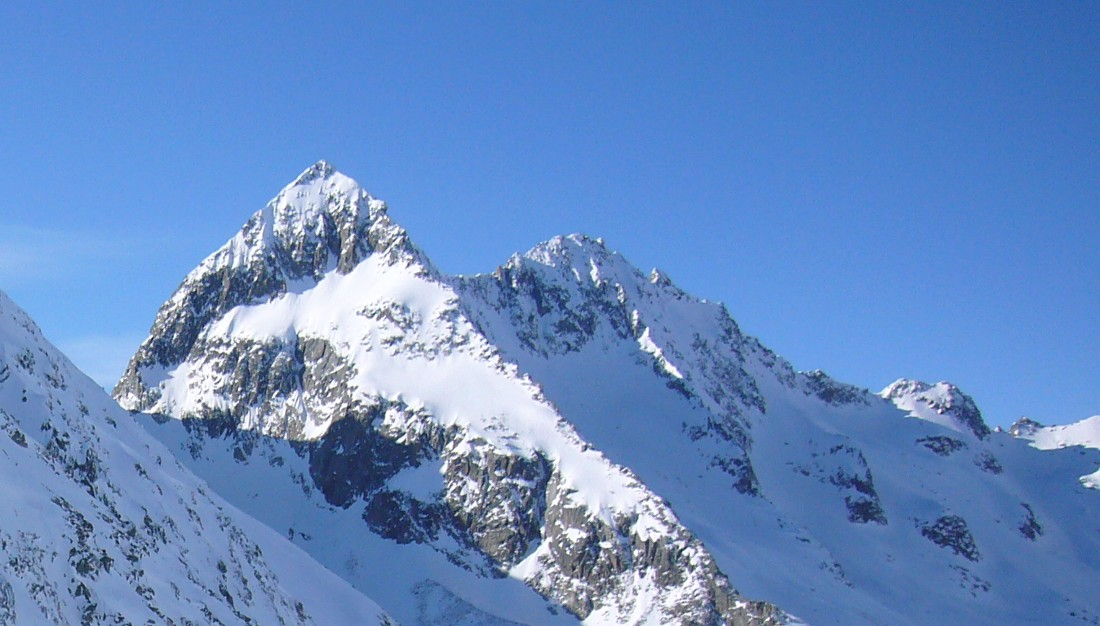 Rienzenstock, rechts von der Fellilücke aus Südost gesehen